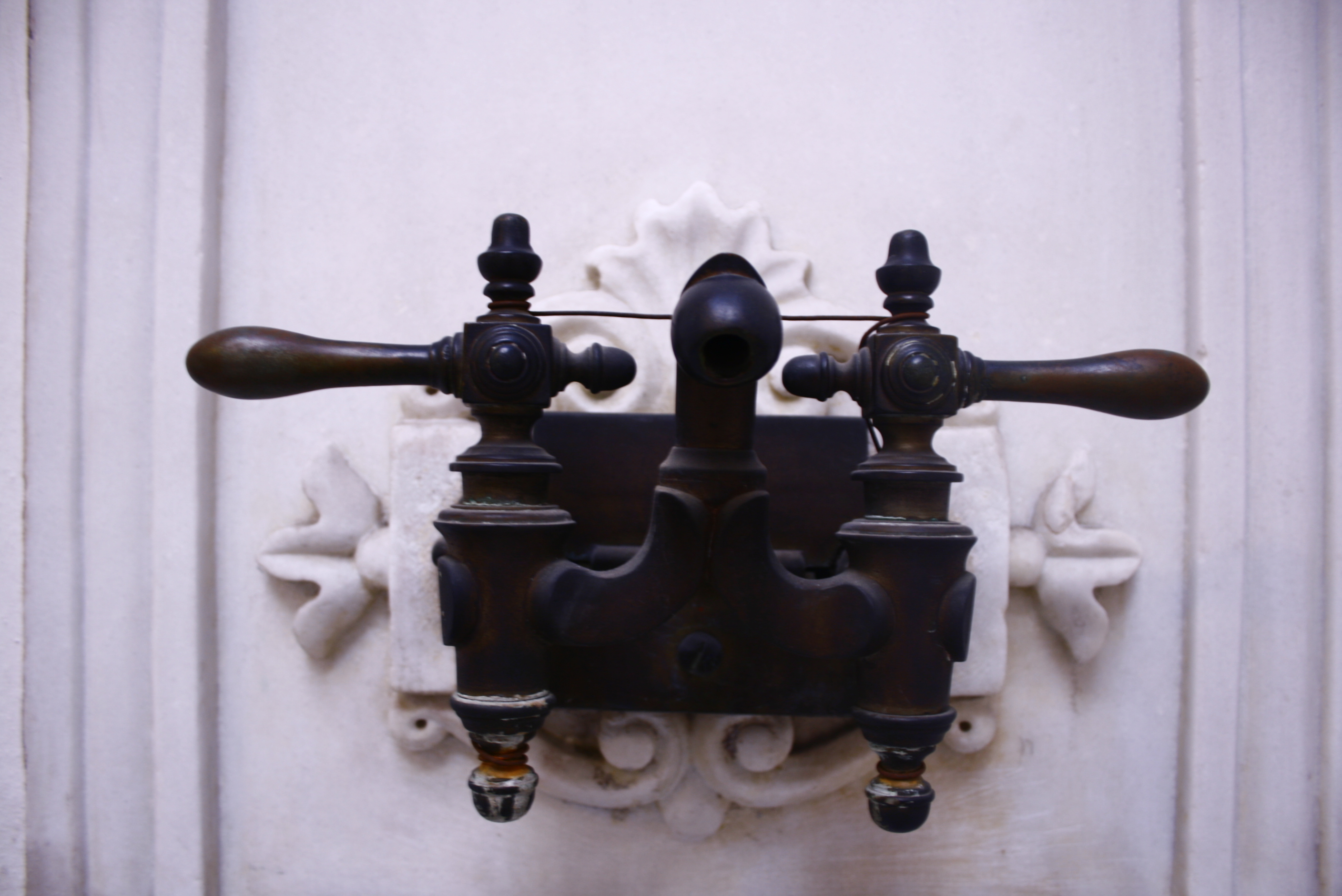 in einem der vielen Hamams des Palastes